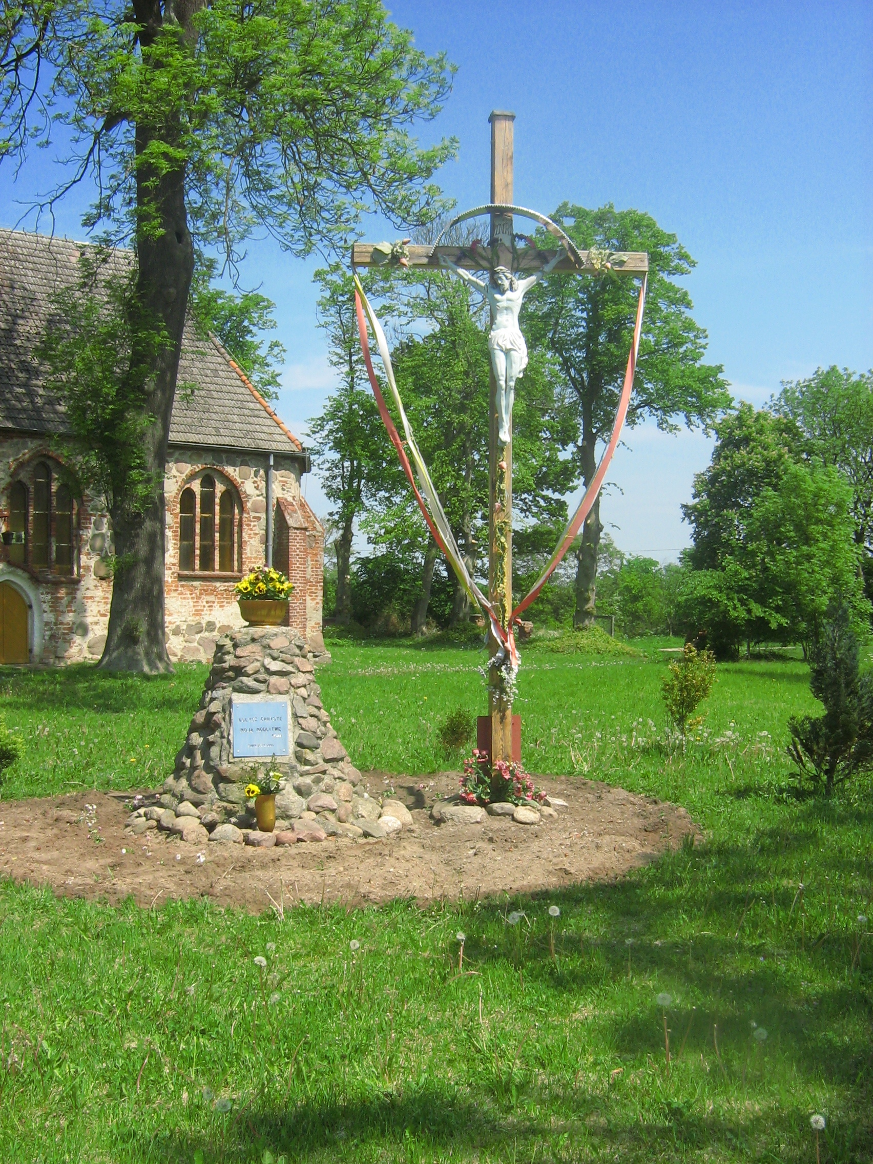 Krzyż przy kościele filialnym p.w. Chrystusa Króla w Sibinie. Na pomniku obok krzyża widneje tabliczka: USŁYSZ CHRYSTE MOJĄ MODLITWĘ ps 33 SIBIN 26.11.2000